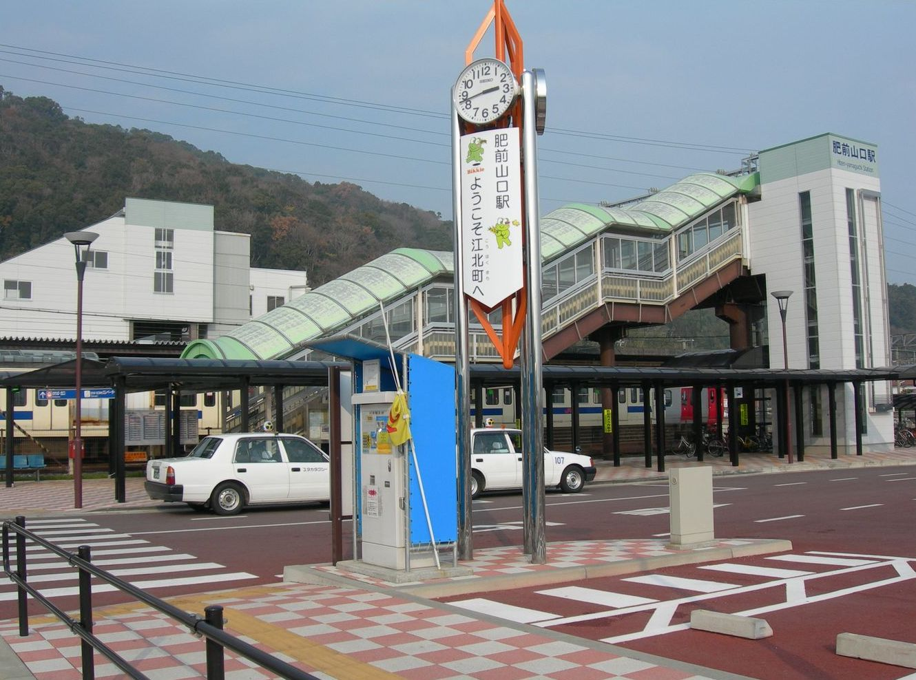 投稿者が2008/01/07に撮影